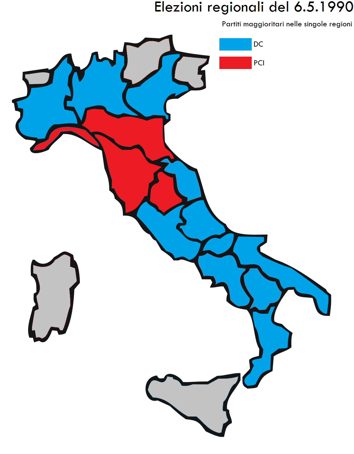 Elezioni regionali italiane del 1990, distribuzione del voto